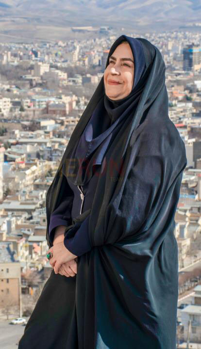 دکتر فاطمه مقصودی